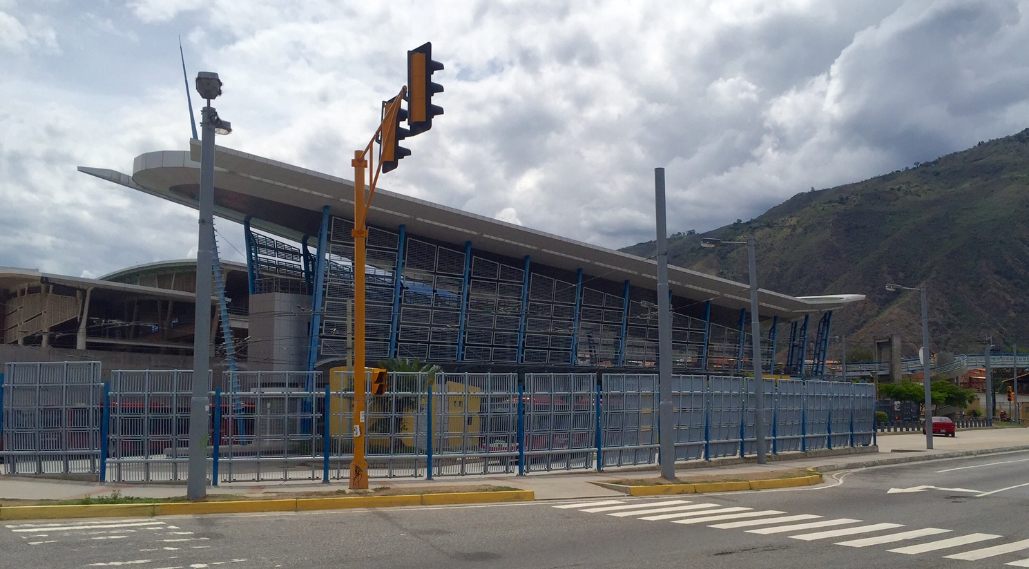 Estación Central del Trolmérida en la Avenida Centenario de Ejido, estado Mérida.